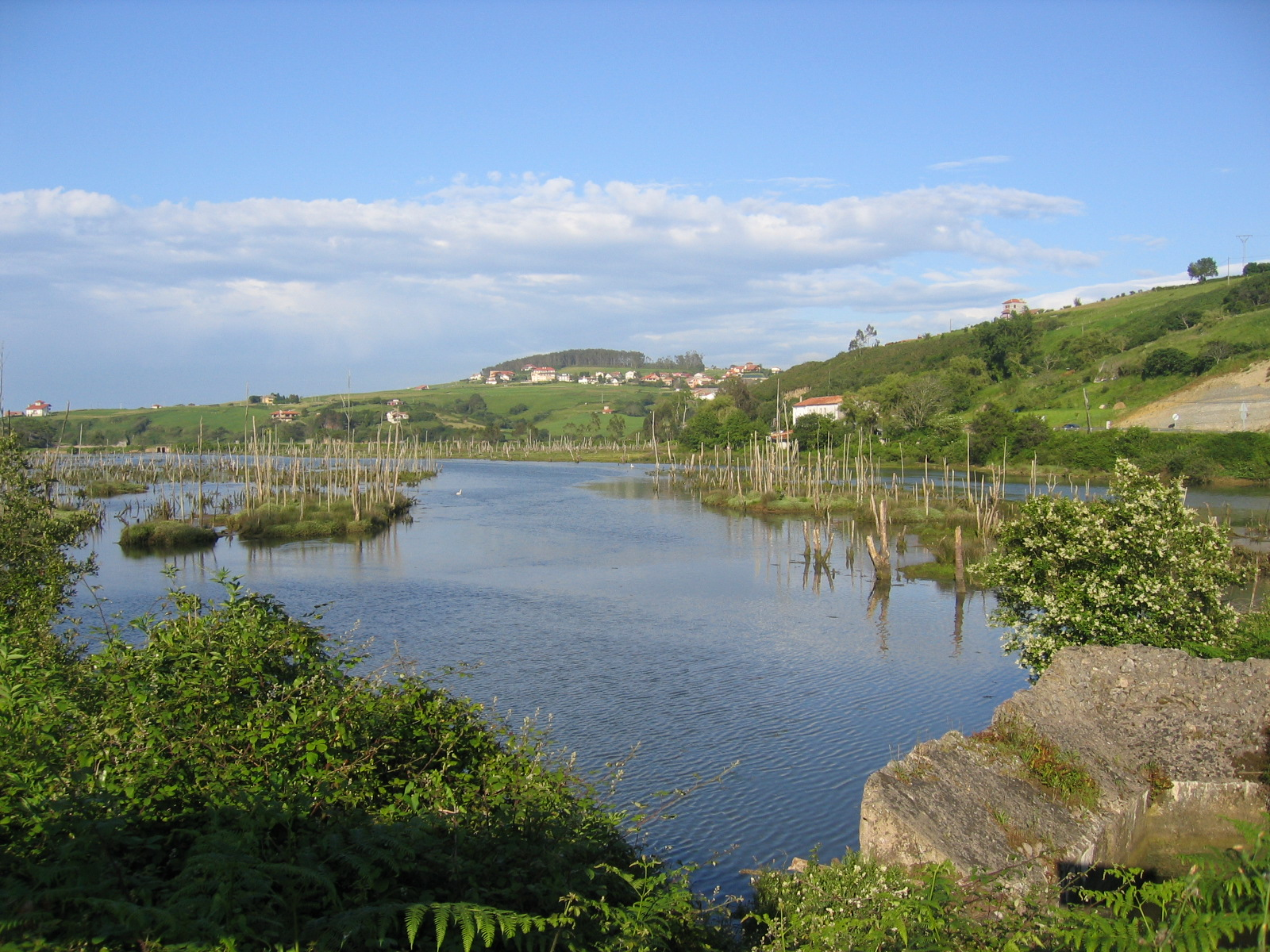 Une végétation aquatique luxuriante permet à de nombreuses espèces animales de se nourrir.